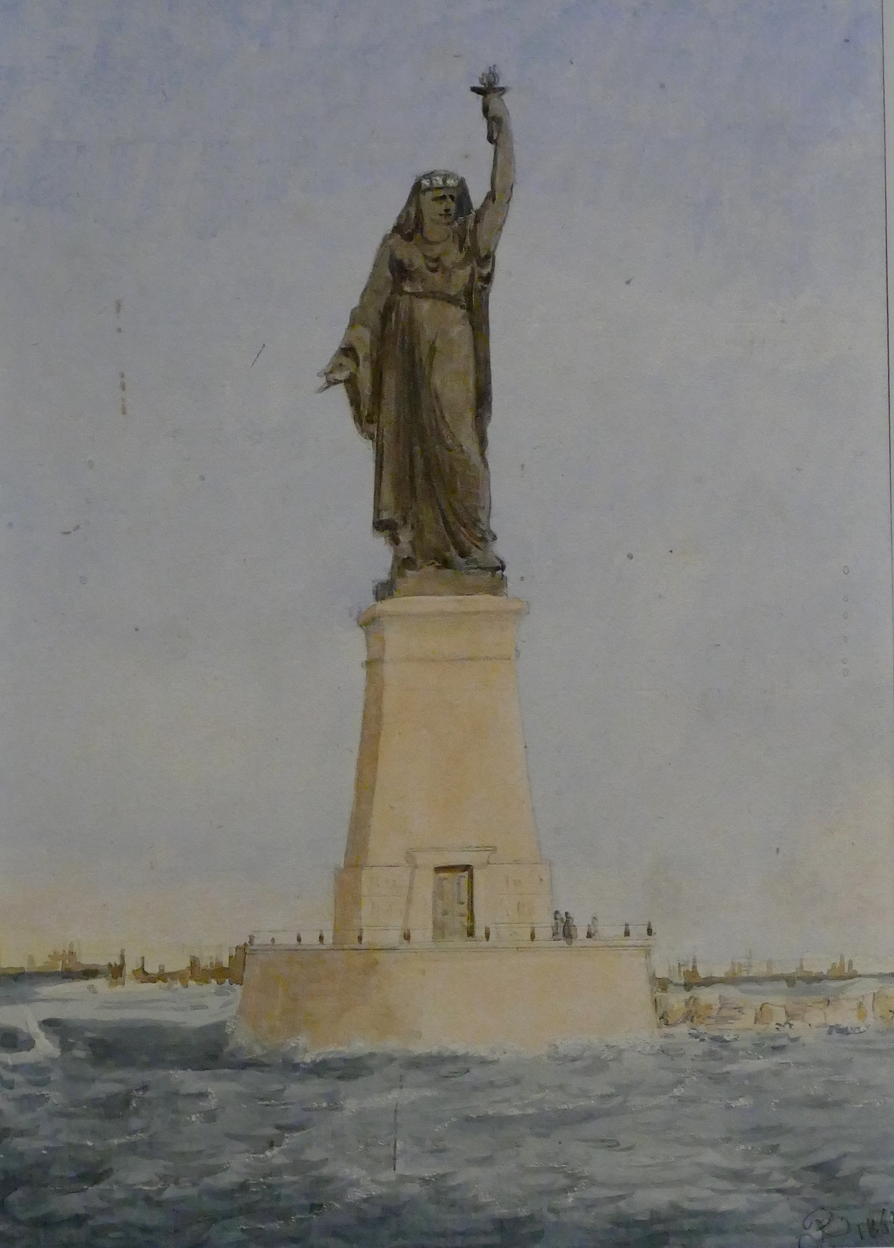 Projet par Auguste Bartholdi d'une statue monumentale à l'entrée du port de Suez. Aquarelle, 1869. Musée Bartholdi de Colmar. Exposé lors de l'exposition Lesseps et le canal de Suez, Institut du monde arade, Paris, juin 2018.